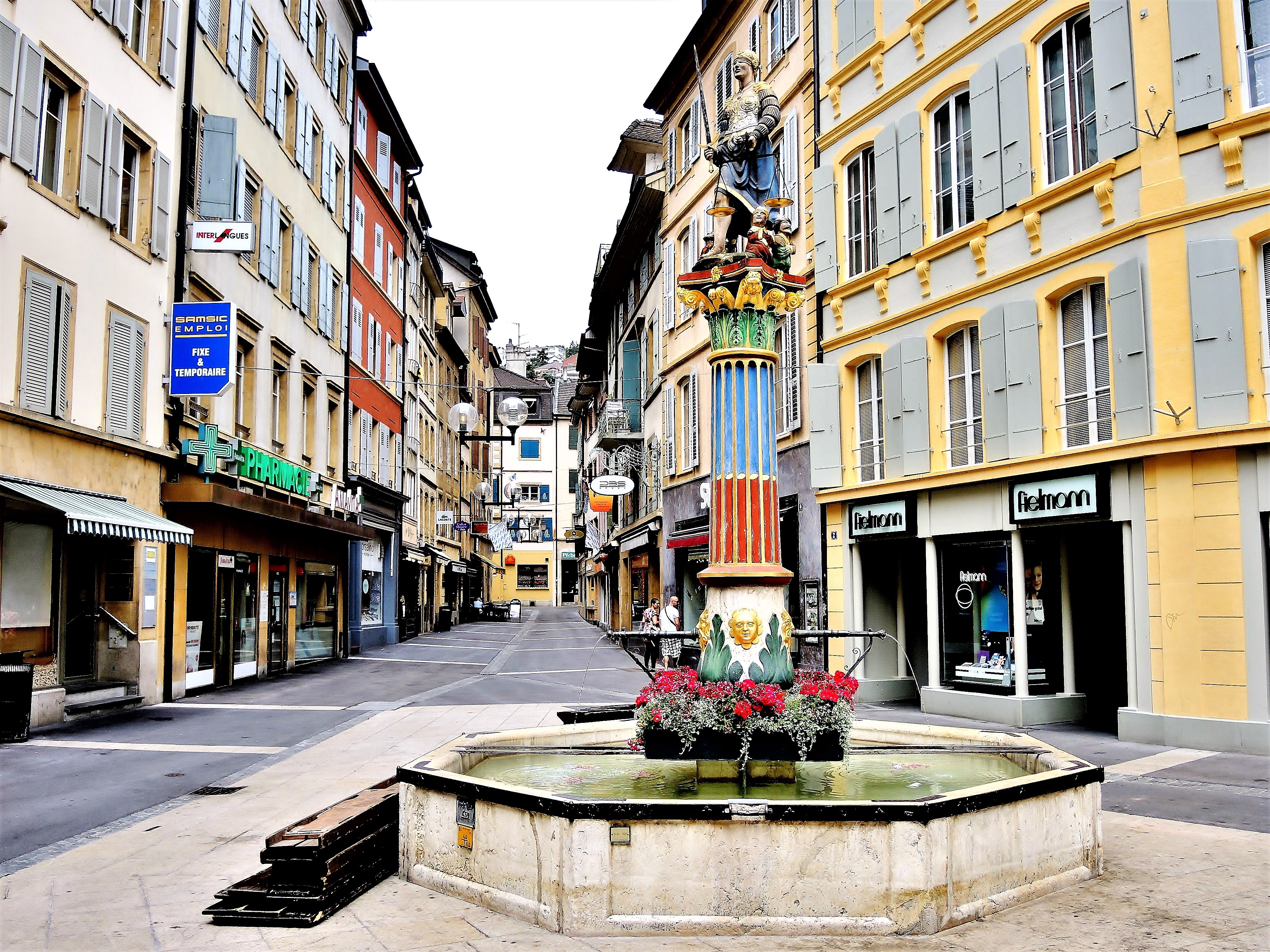 Une des fontaines de la ville de Neuchâtel. Suisse.